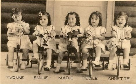 ebayで販売。1937年に発行された古い葉書